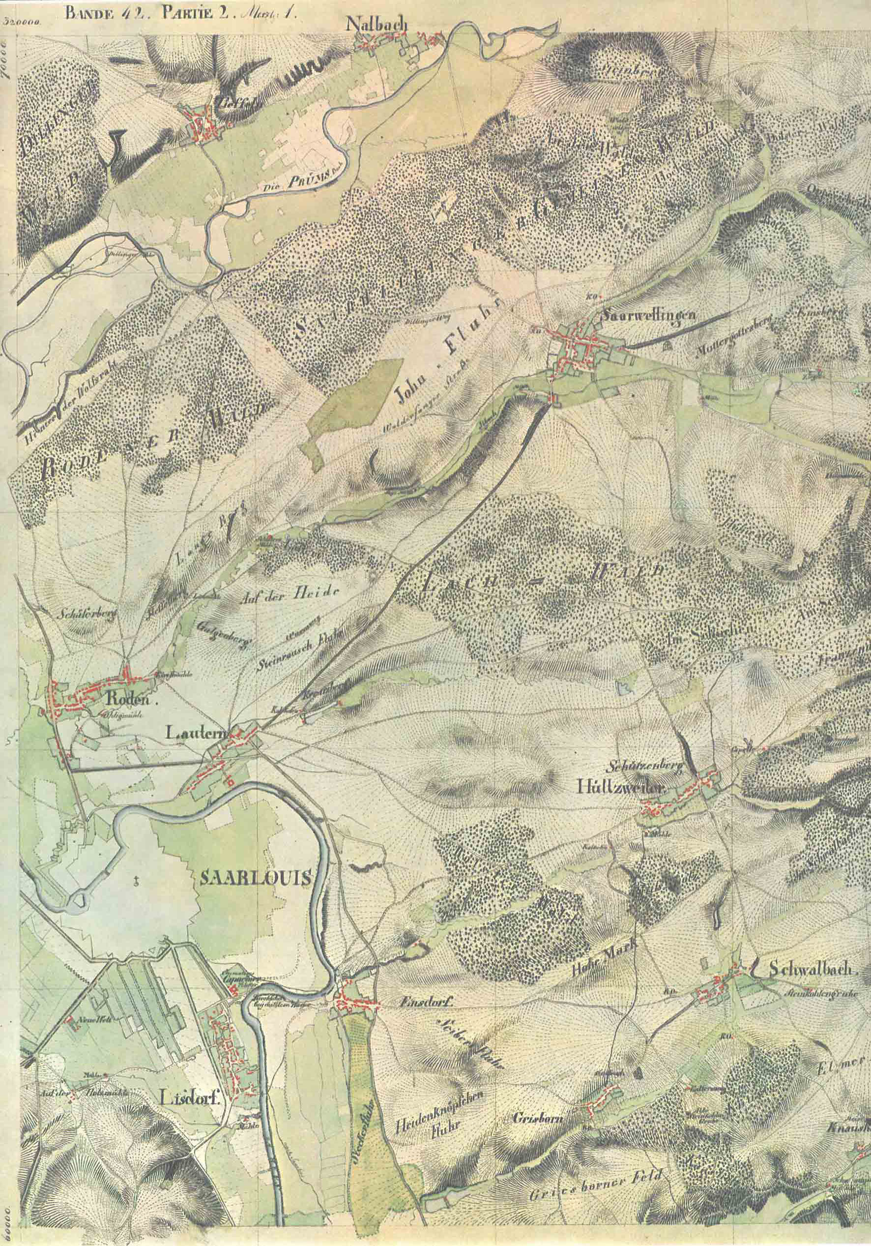 Diefflen, Kartenaufnahme der Rheinlande durchTranchot und v. Müffling 1803-1820, 255 Saarlouis, Publikationen der Gesellschaft für Rheinische Geschichtskunde, XII, 2. Abteilung, Neue Folge, hrsg. vom Landesvermessungsamt des Saarlandes 1969, aufgenommen im Jahr 1818 von Leutnant Cornely und Leutnant Reiche, Maßstab 1 : 25.000, 4 cm auf der Karte entsprechen 1 km in der Natur